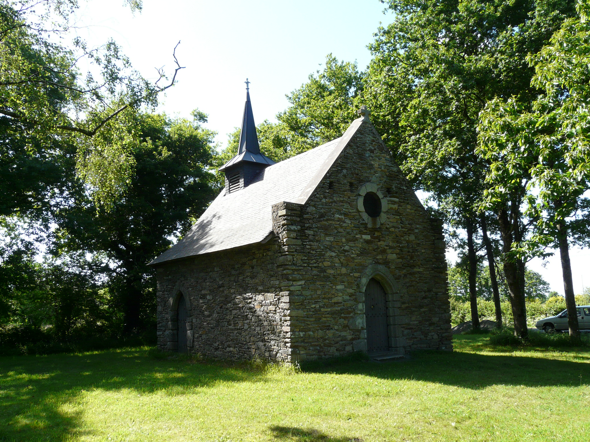 Vue d'ensemble de la Chapelle St Julien